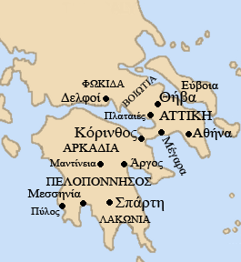 Αρχαία Ελλάδα